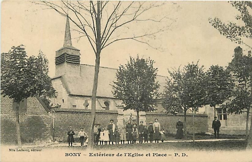 Carte postale de l'église avant 1914.